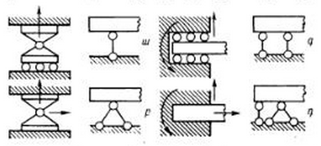 Հենարաններ